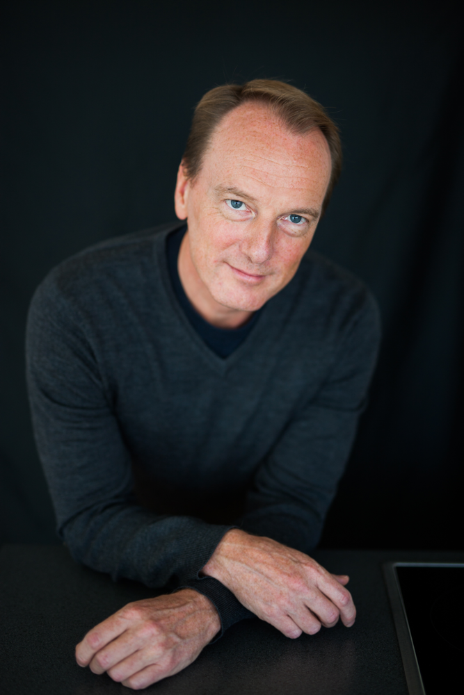 Marc Elsberg, österreichischer Schriftsteller